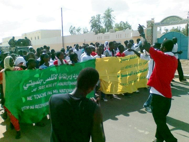 [Bakari Gueye] Some Mauritanians claim that the country's census discriminates against ethnic minorities. بعض الموريتانيين يزعمون أن الإحصاء التي تقوده البلاد فيه تمييز ضد الأقليات العرقية Certains Mauritaniens affirment que le recensement en cours dans le pays est discriminatoire envers les minorités ethniques.